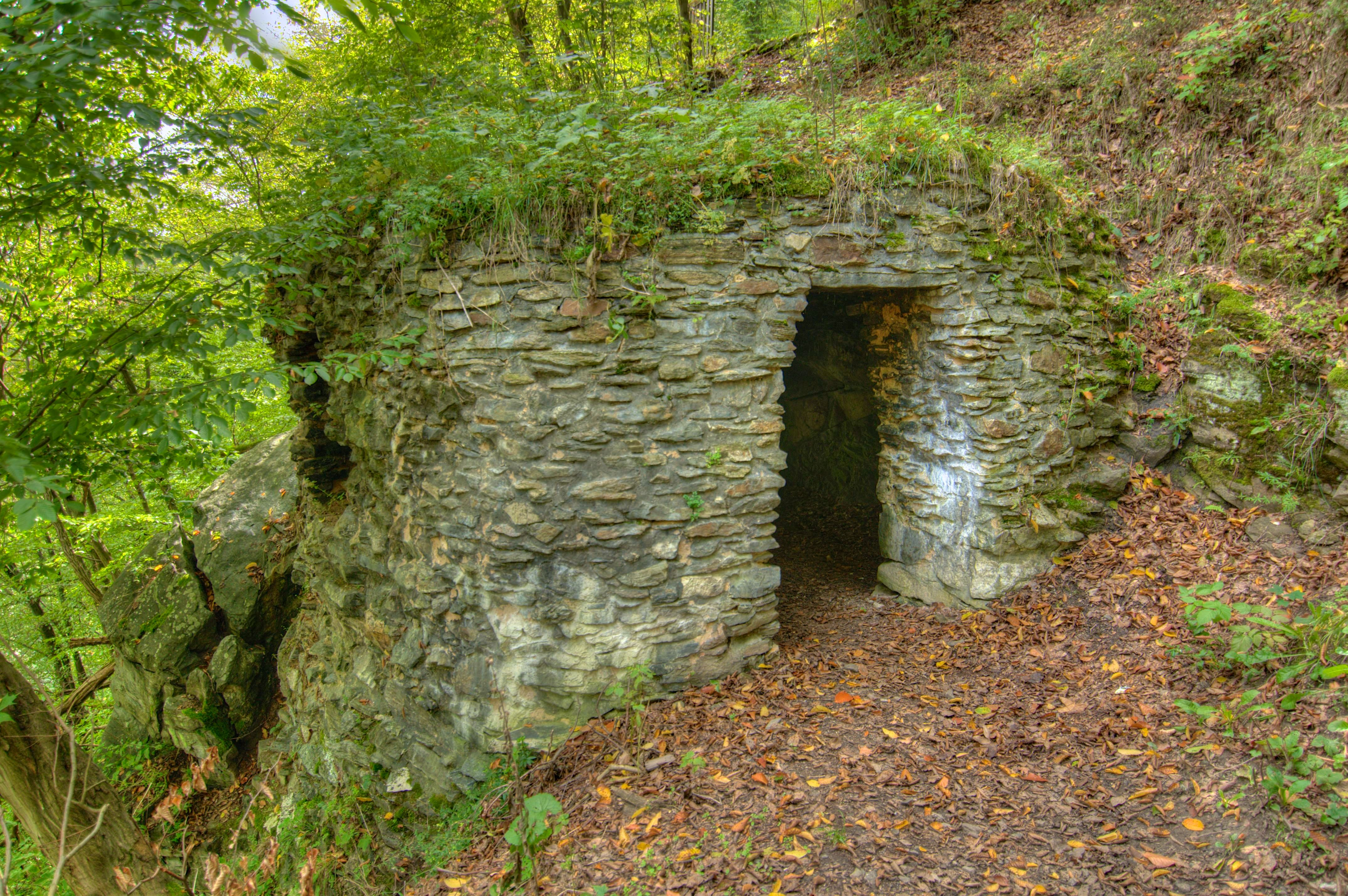 Poustevna jižně od hradu Český Šternberk